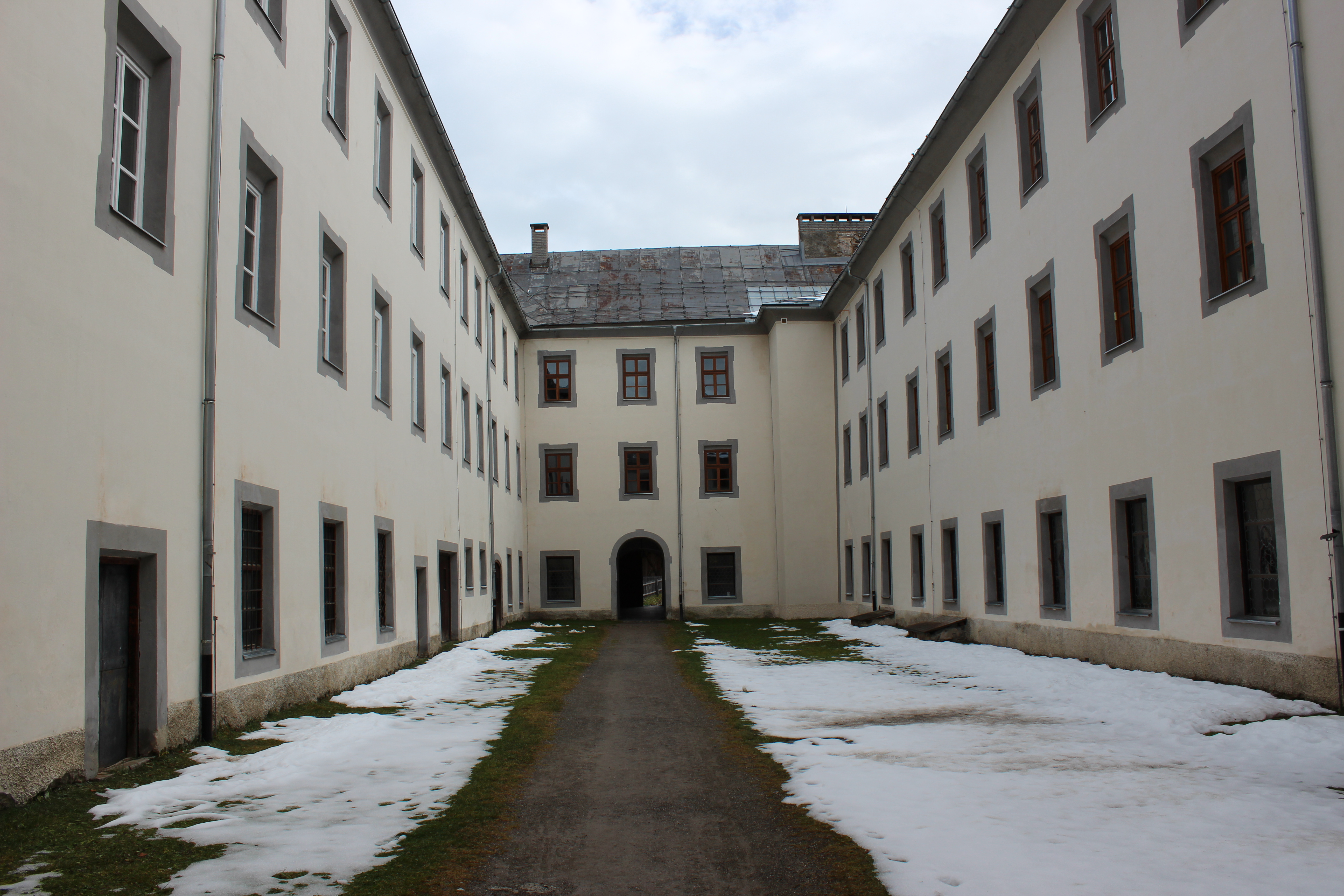 Servitenkloster Maria Luggau Innenhof